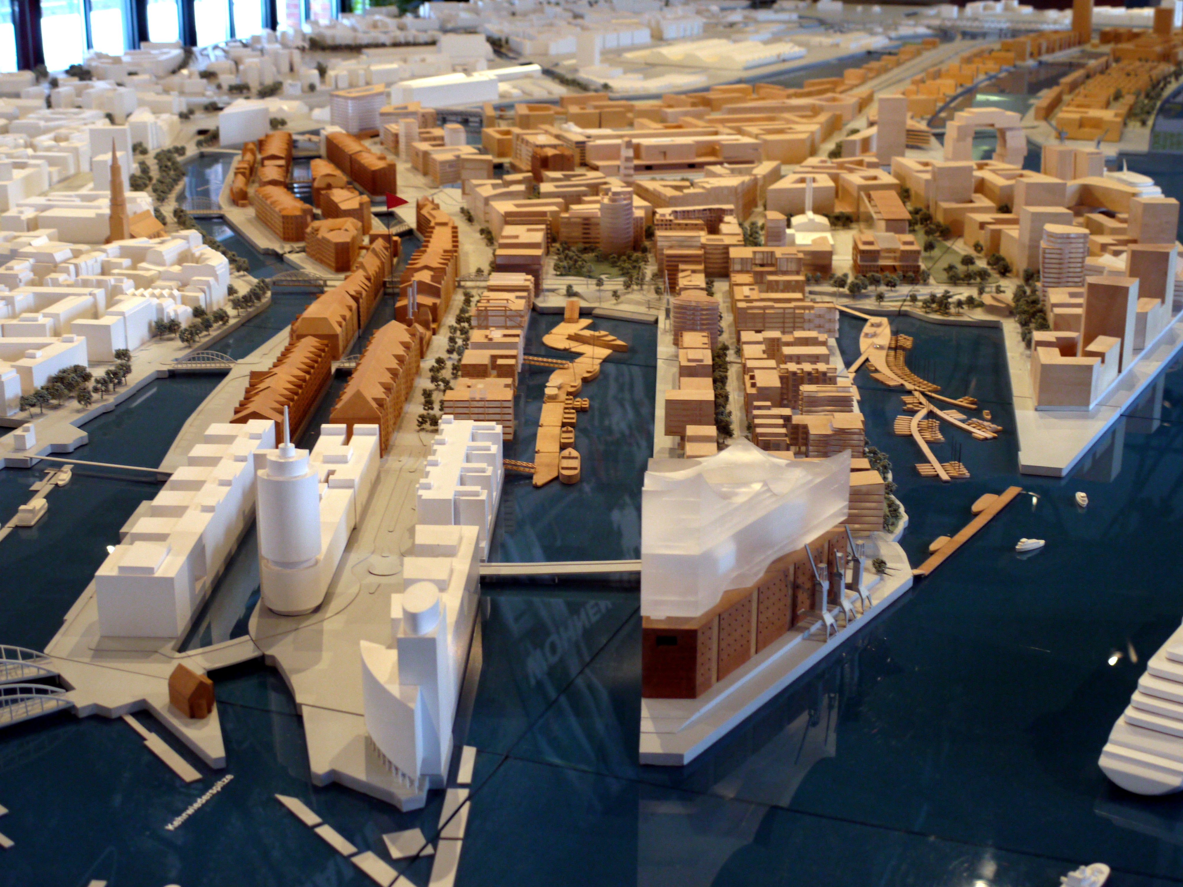 Modell der HafenCity im HafenCity-Informationszentrum.